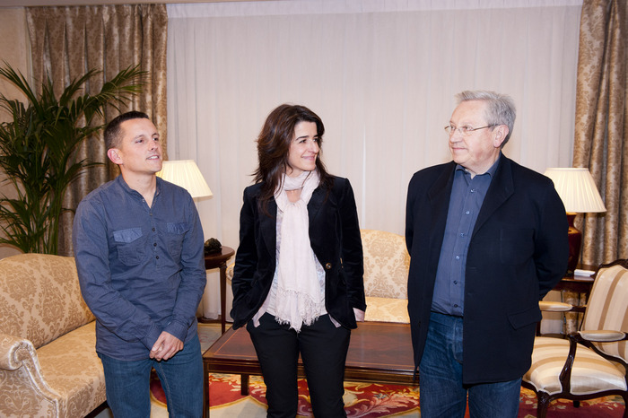 El coordinador general de Aralar, Patxi Zabaleta, la portavoz parlamentaria, Aintzane Ezenarro, y el parlamentario de este mismo partido, Daniel Maeztu, en Vitoria, reunidos con el Lehendakari, Patxi López, con motivo de la ronda de partidos para analizar la situación tras el último comunicado de ETA.